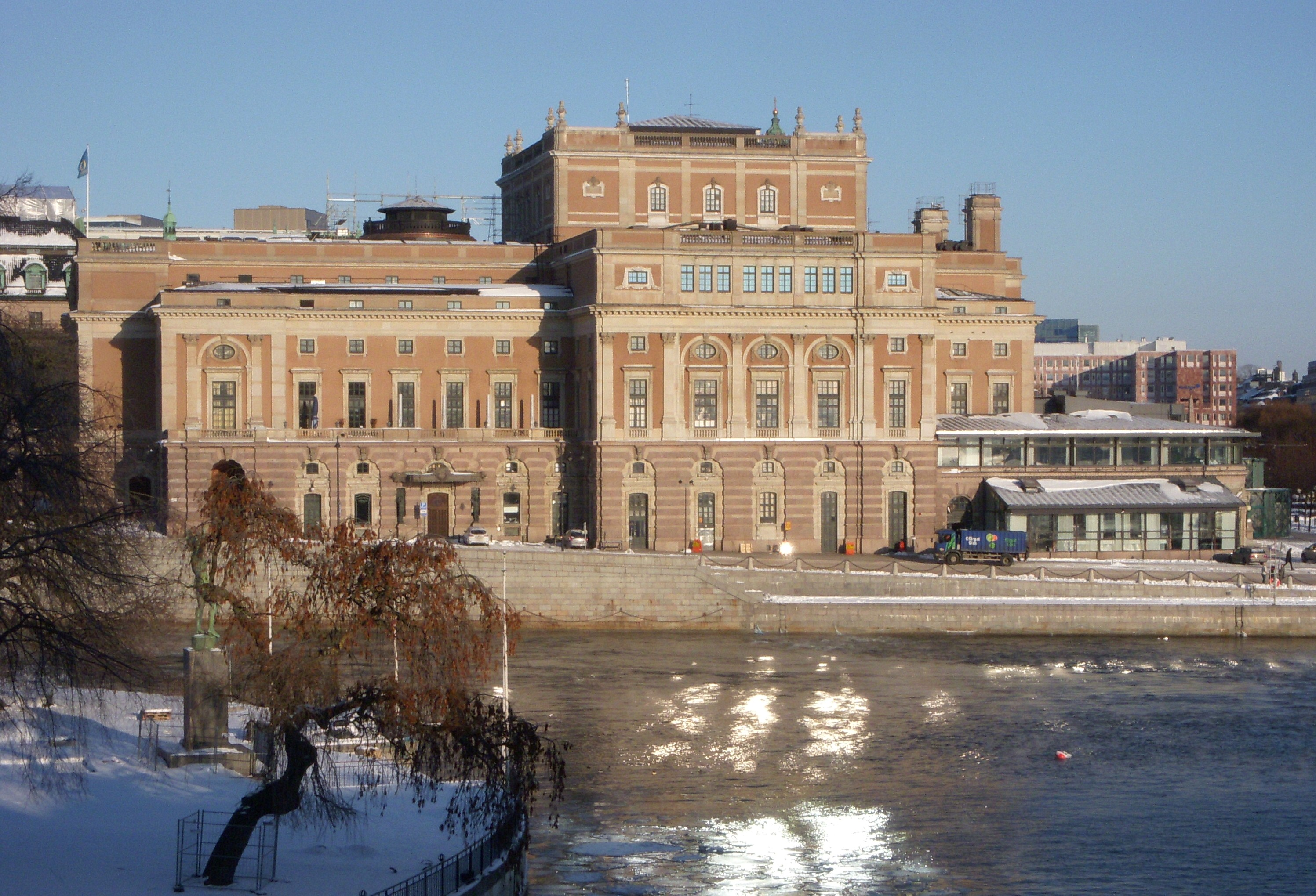 Kungliga Operan i Stockholm, fasad mot syd